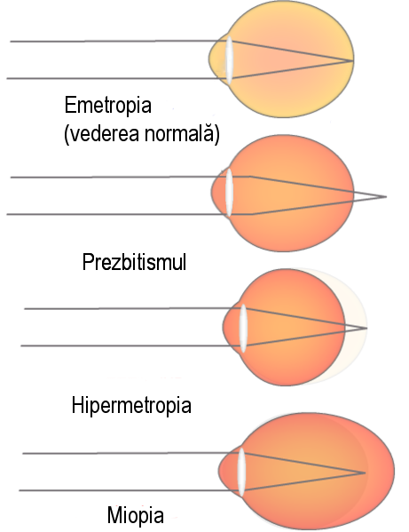 Diferenţele dintre principalele defecte de vedere